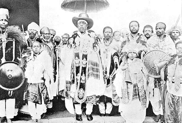 Menelik II.